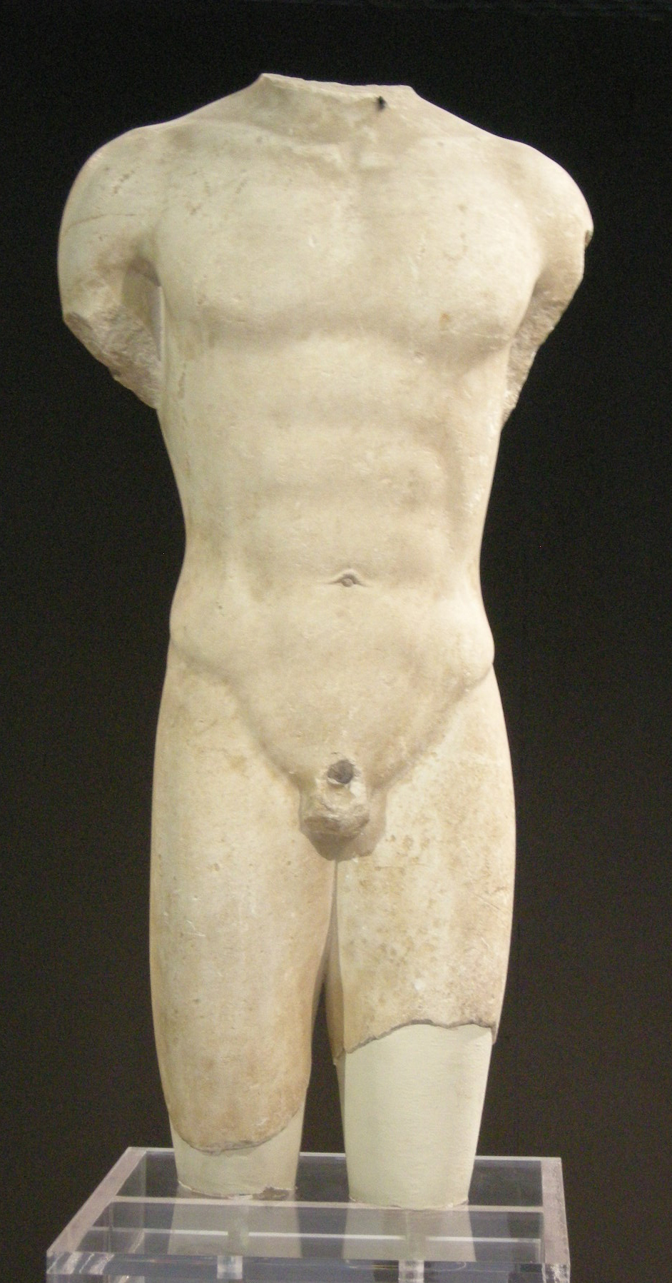 Museo archeologico regionale paolo orsi di Siracusa, torso di kouros da Lentini, fine VI-inizio V sec. ac.